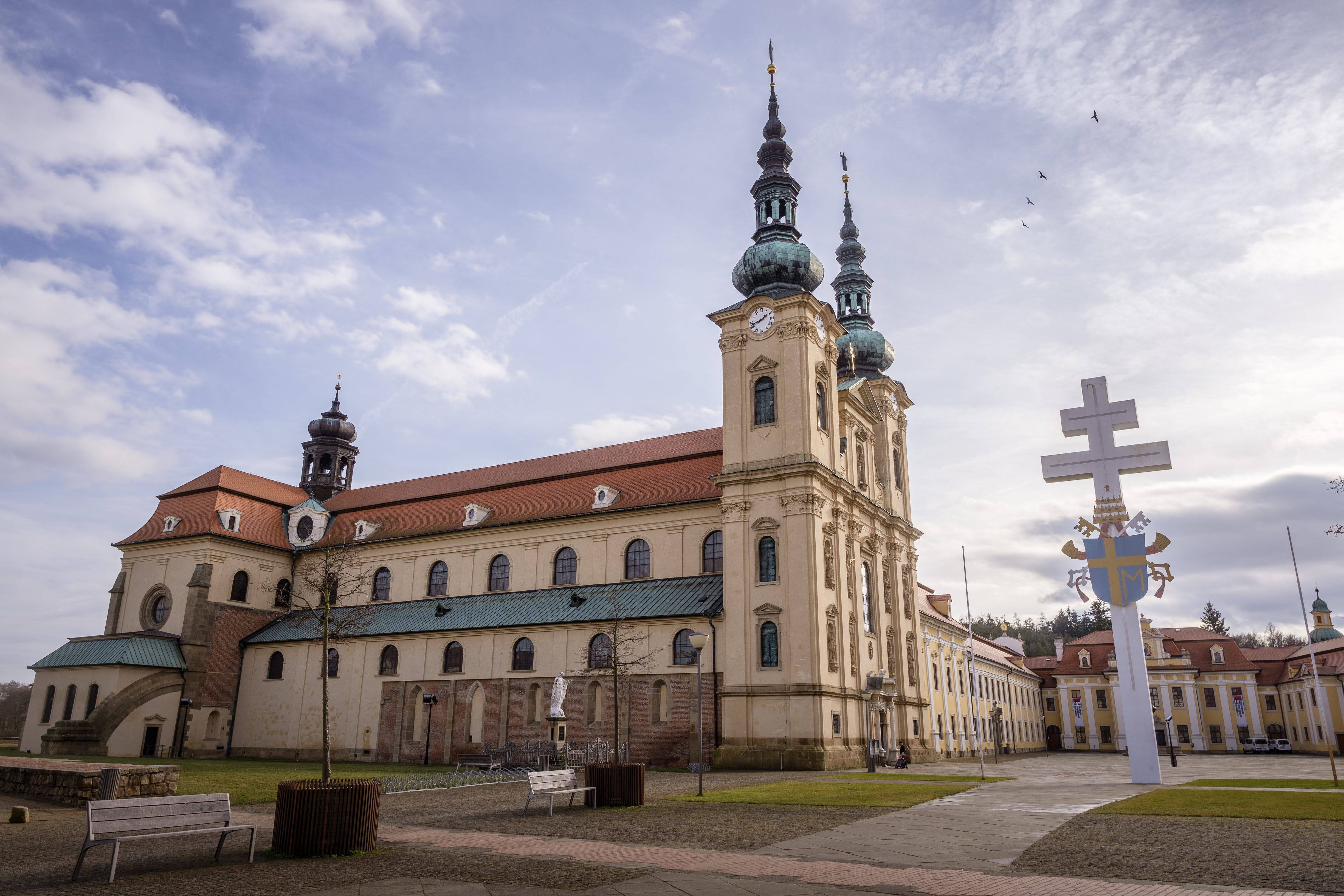 Bazilika v roce 2020